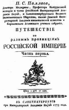 Титульный лист первой части "Путешествия..."